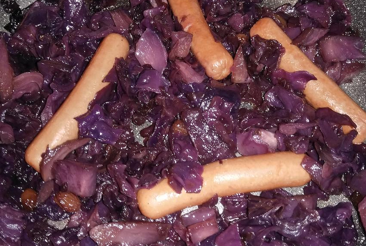 Würstel con contorno di cavoli rossi stufati